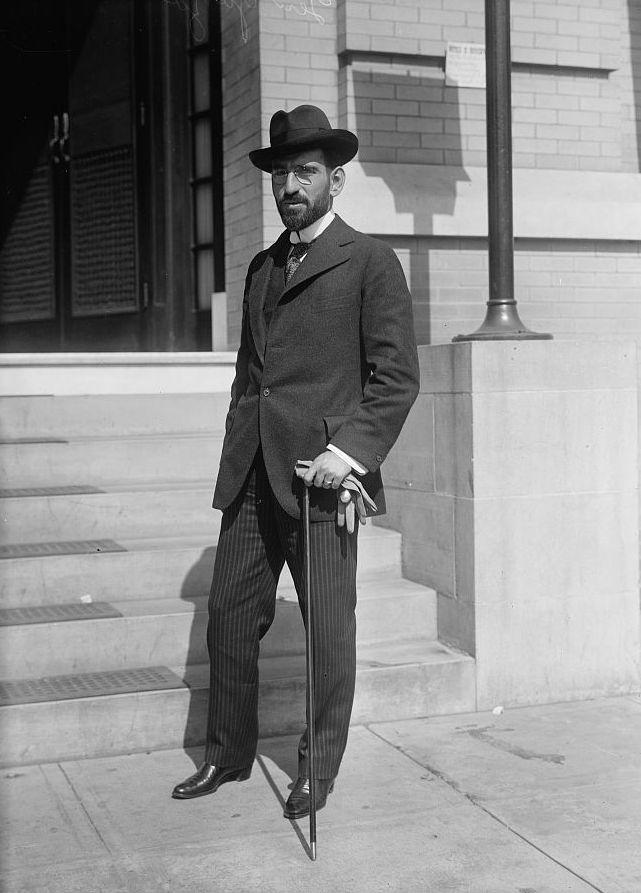 Depicted person: Roque González Garza